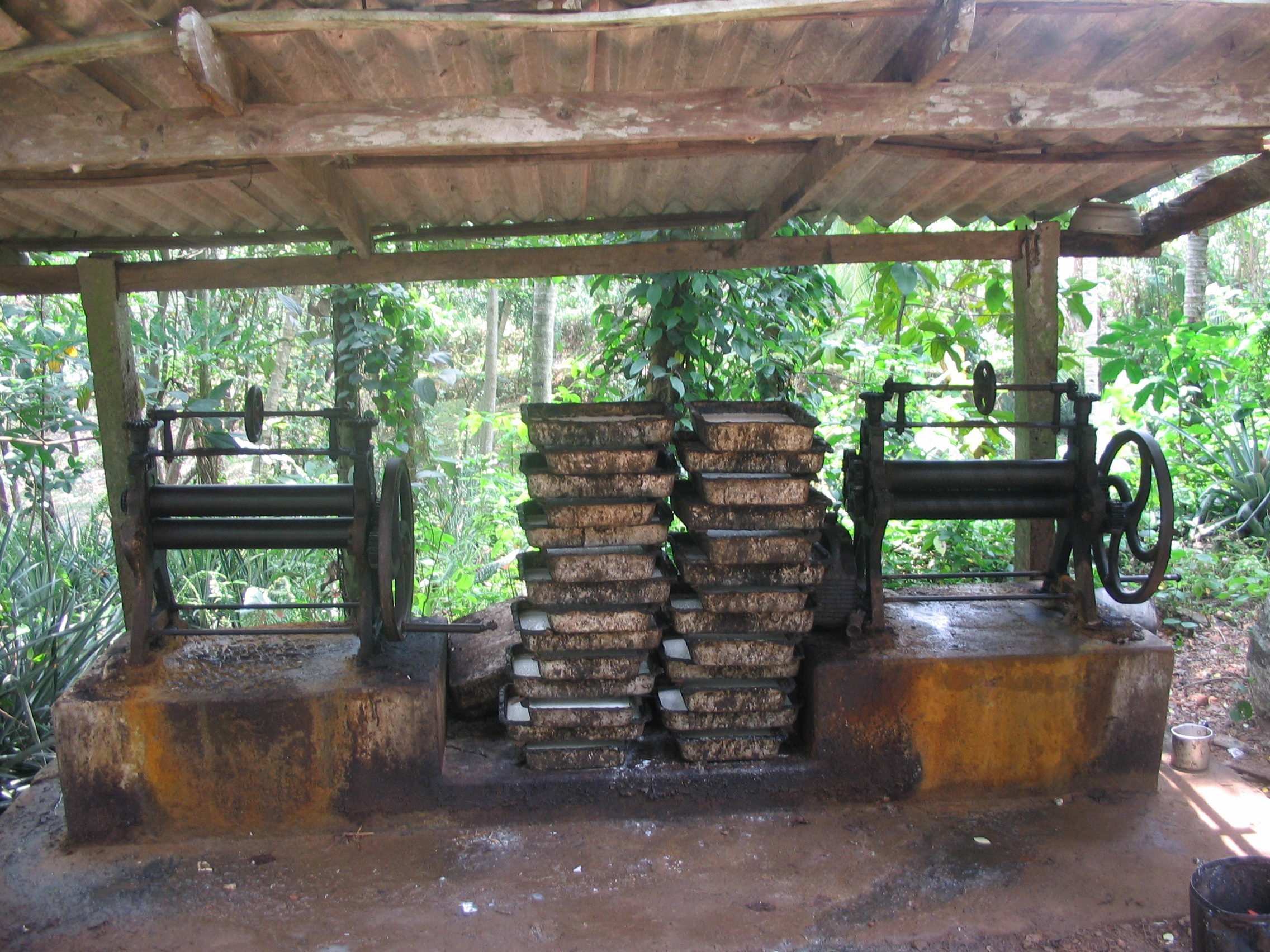 Rubber Machine